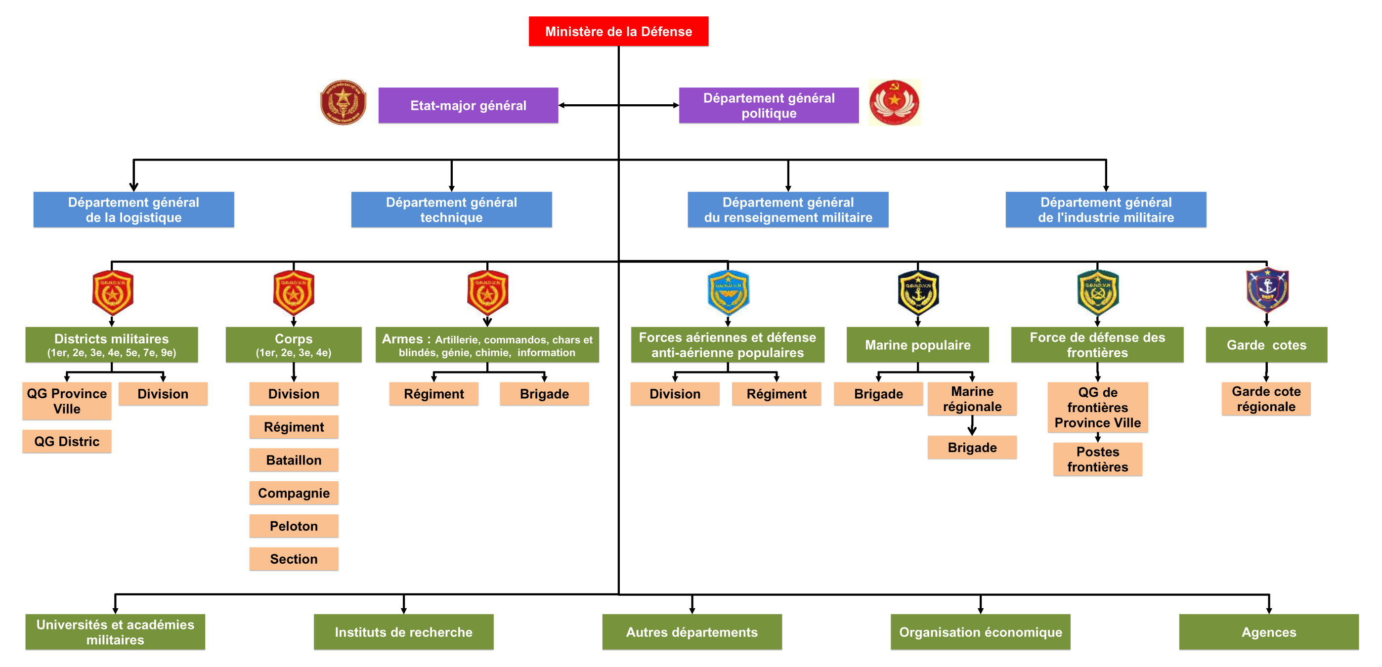 Organigramme de l'armée vietnamienne d'après le schéma anglais disponible dans Wikipedia Vietnam People's Army structure de Pham Nguyen Phuong Quynh